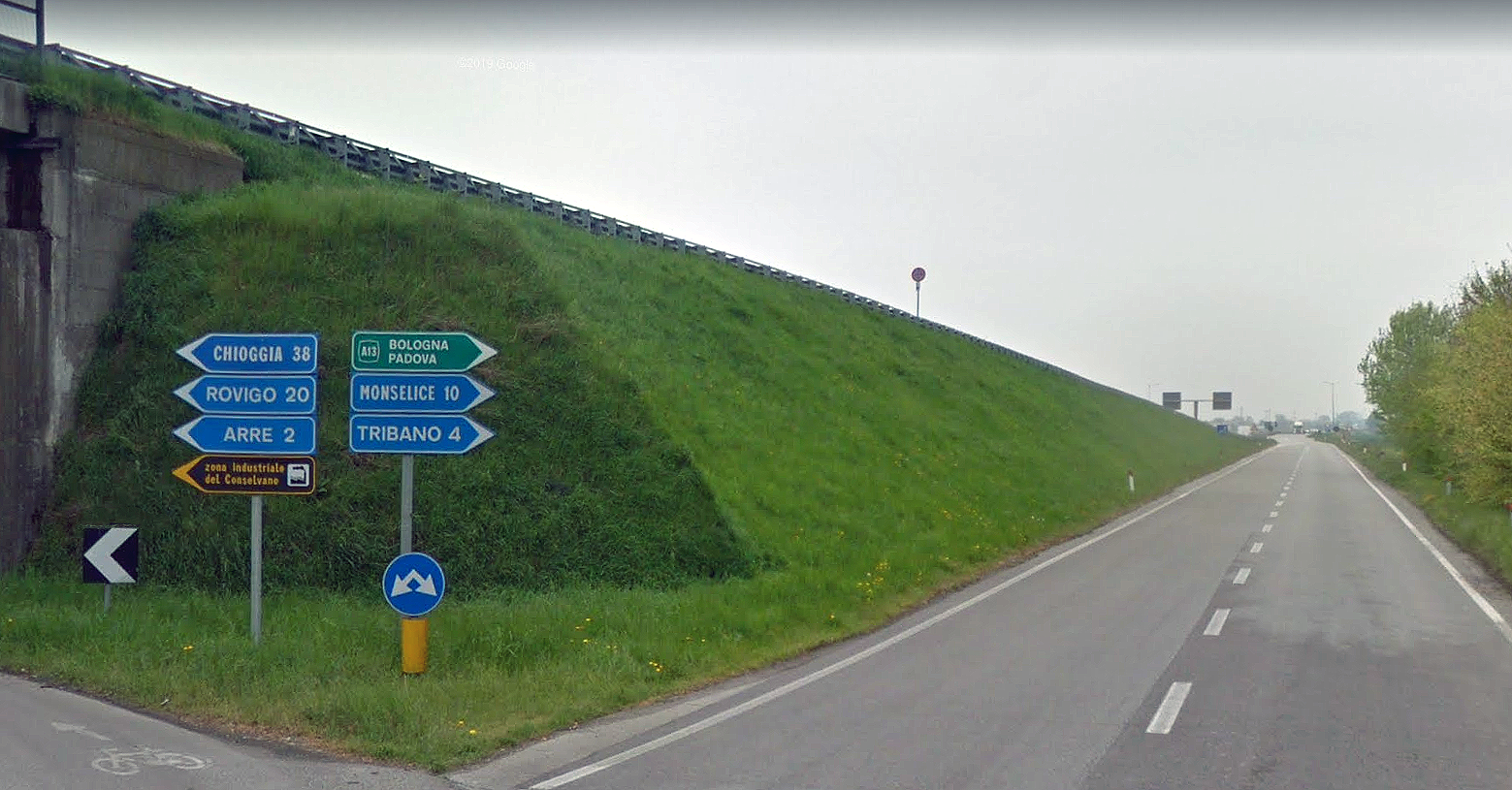 SR104 Monselice-mare